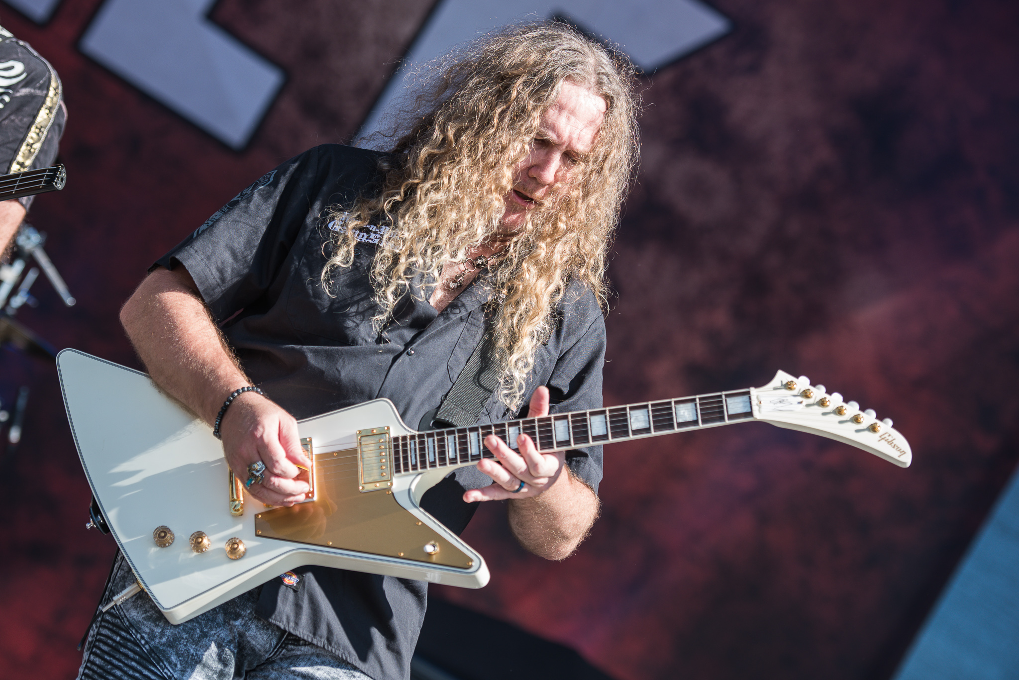 Brombachsee,Concertbüro Franken,Festival,Konzert,Lieder am See,Livekonzert,Livemusik,Musik,The Sweet,Tony O'Hora